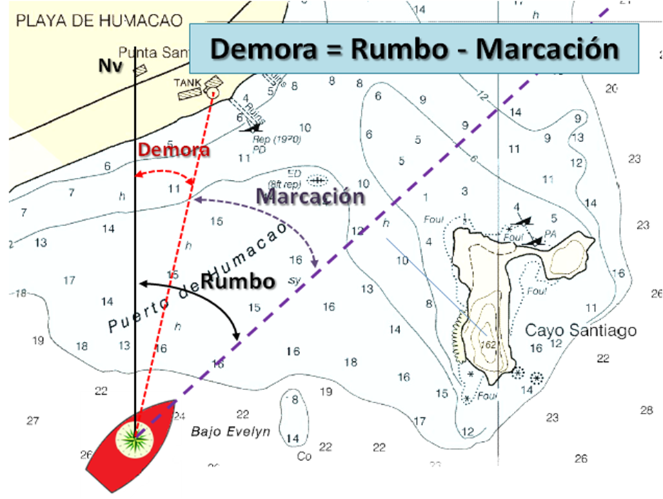 Marcación por Br (-); Demora = Rumbo - Marcación